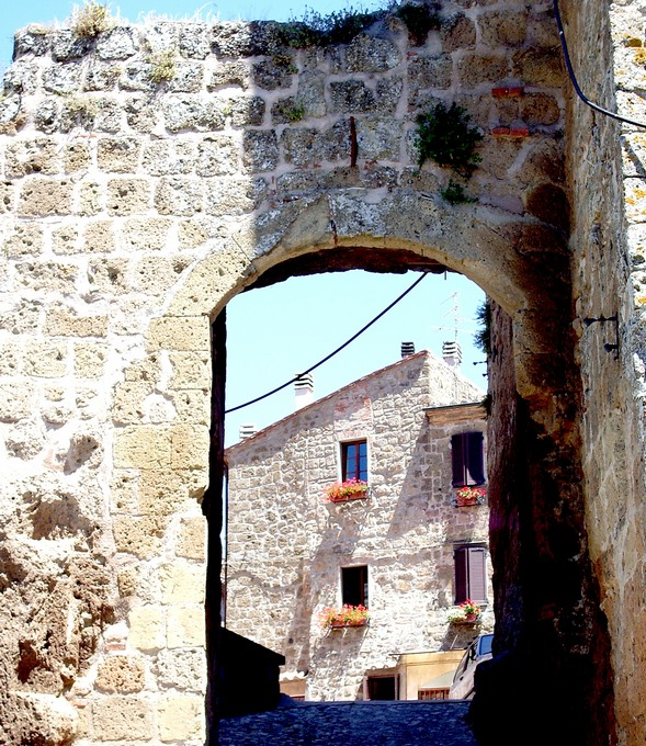 Porta di Castell'Ottieri (GR), Tuscany (Italy)